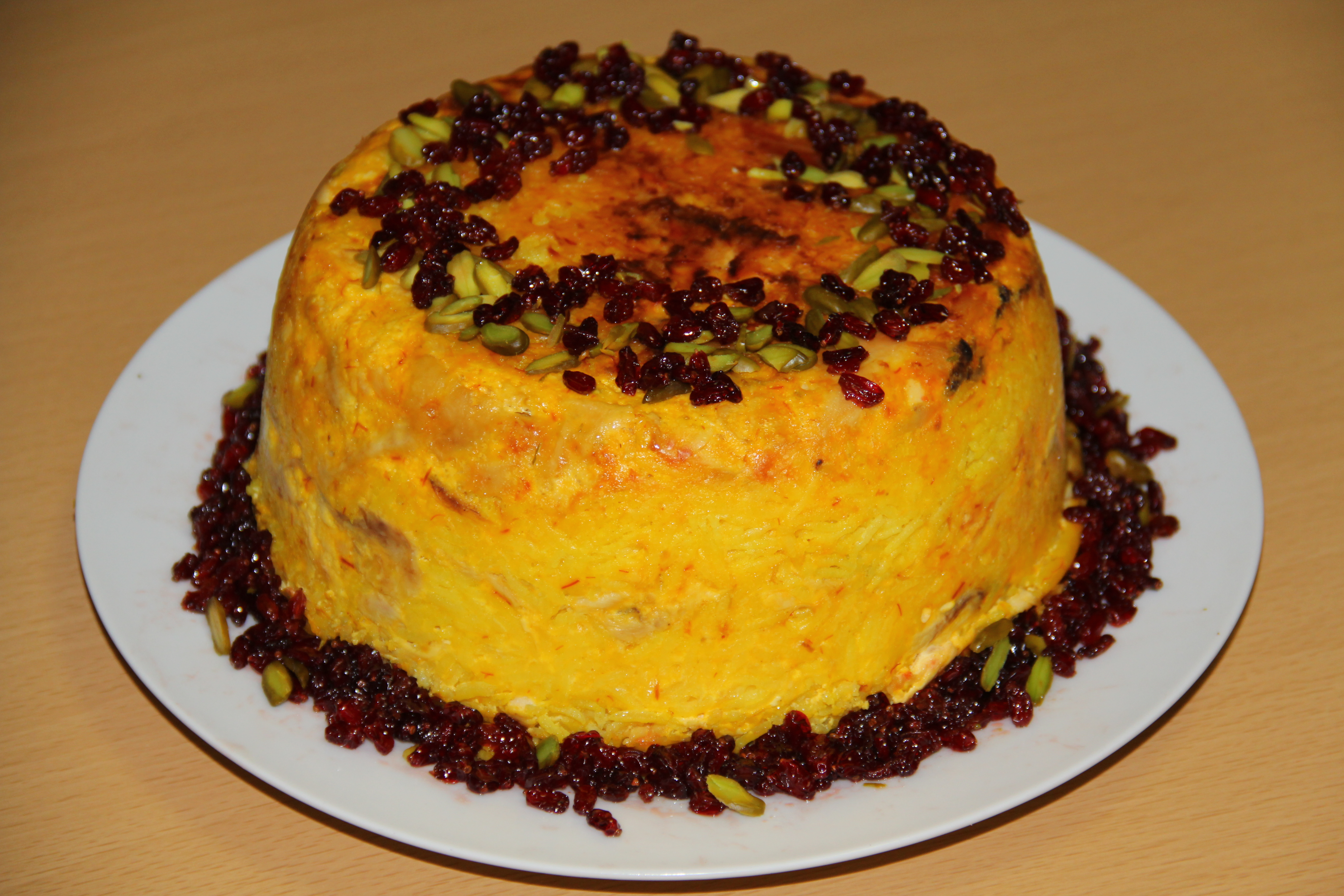 Tahchin ته چین